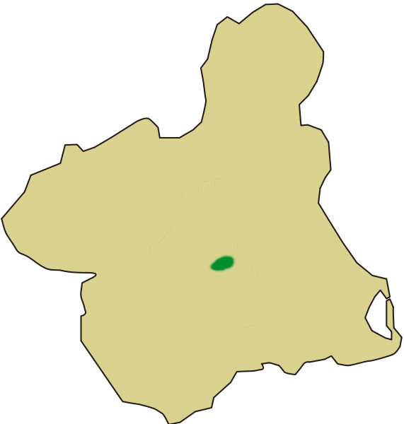 Situación espacio protegido